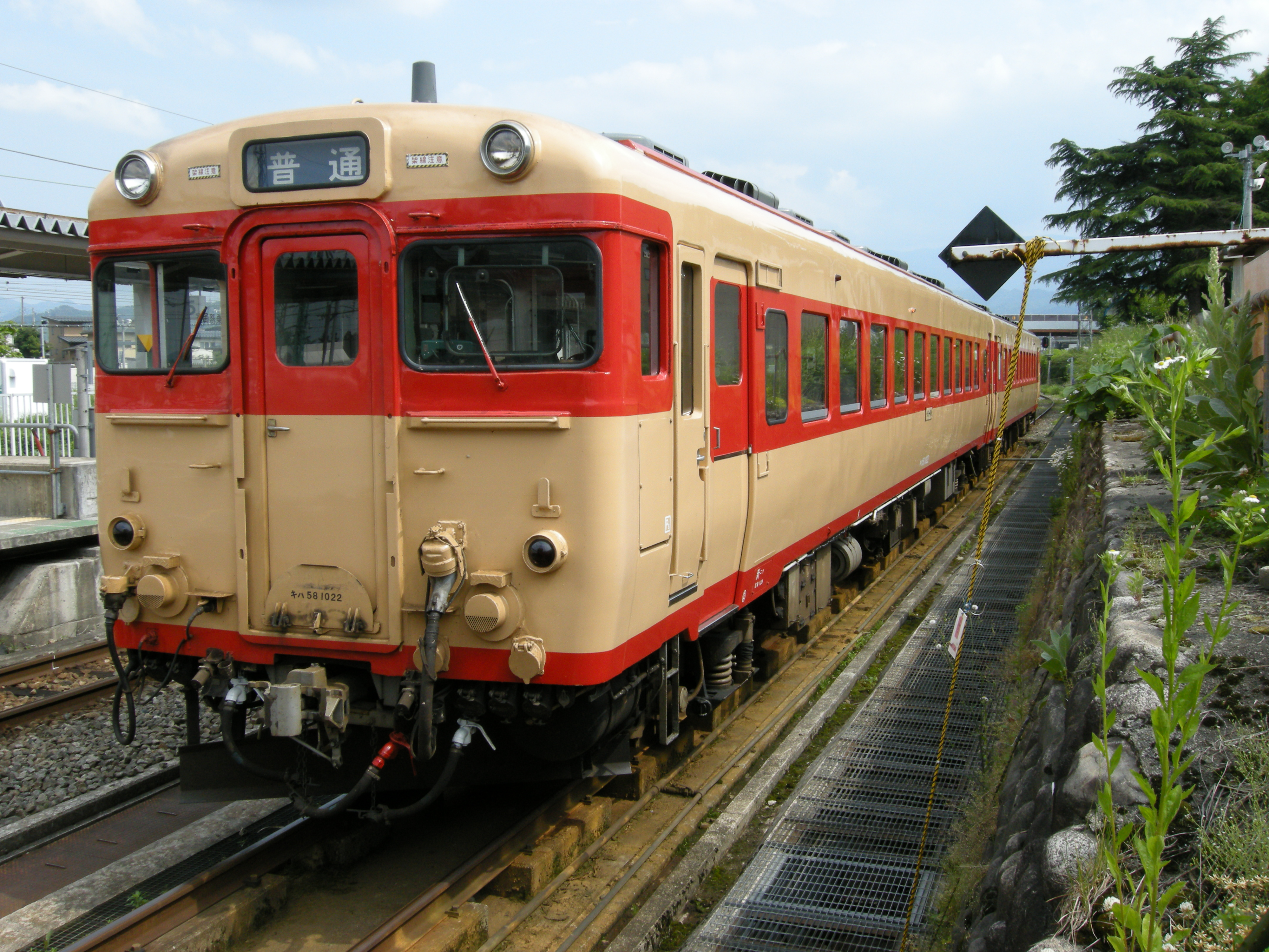 キハ58形